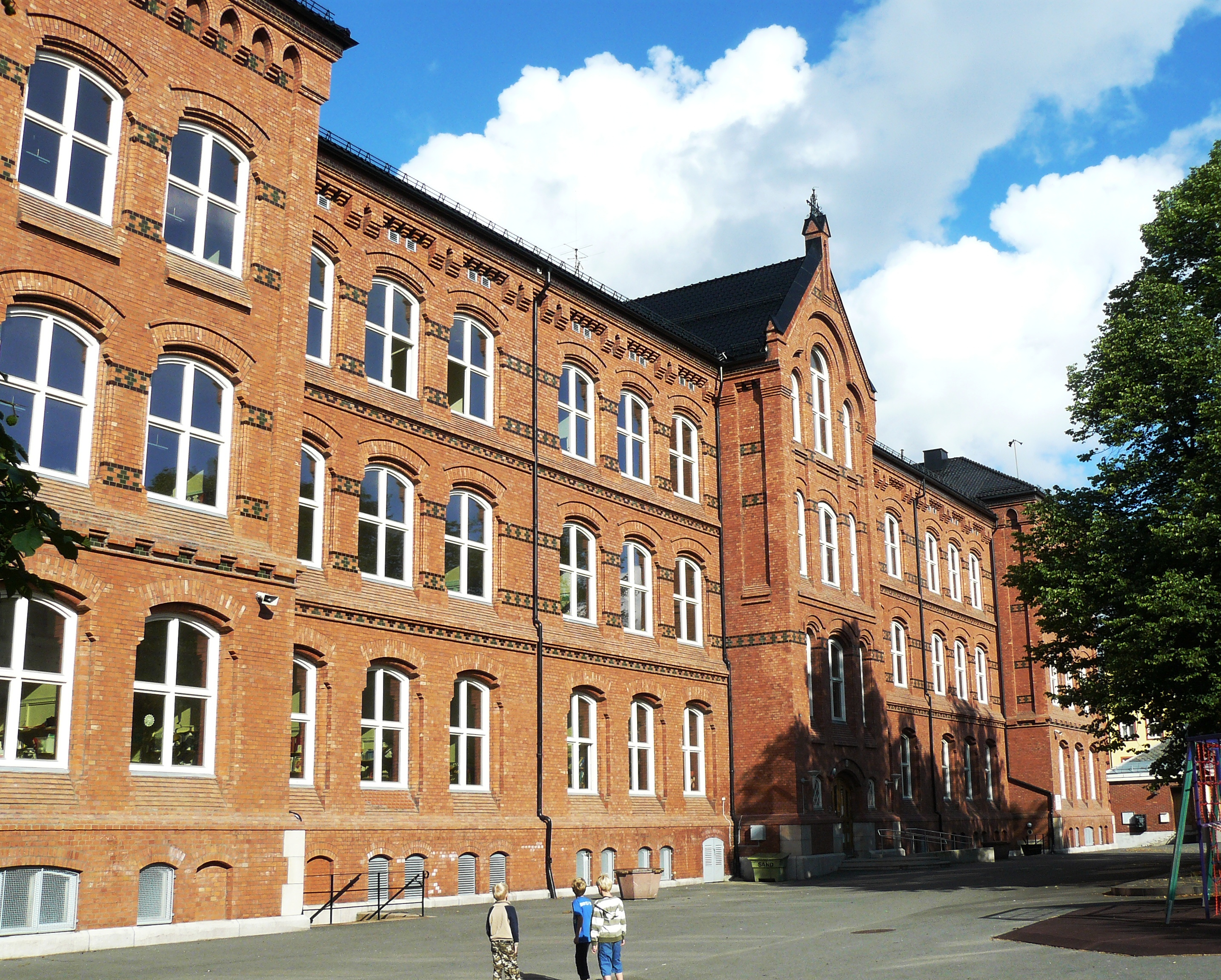 Vålerenga school, Oslo